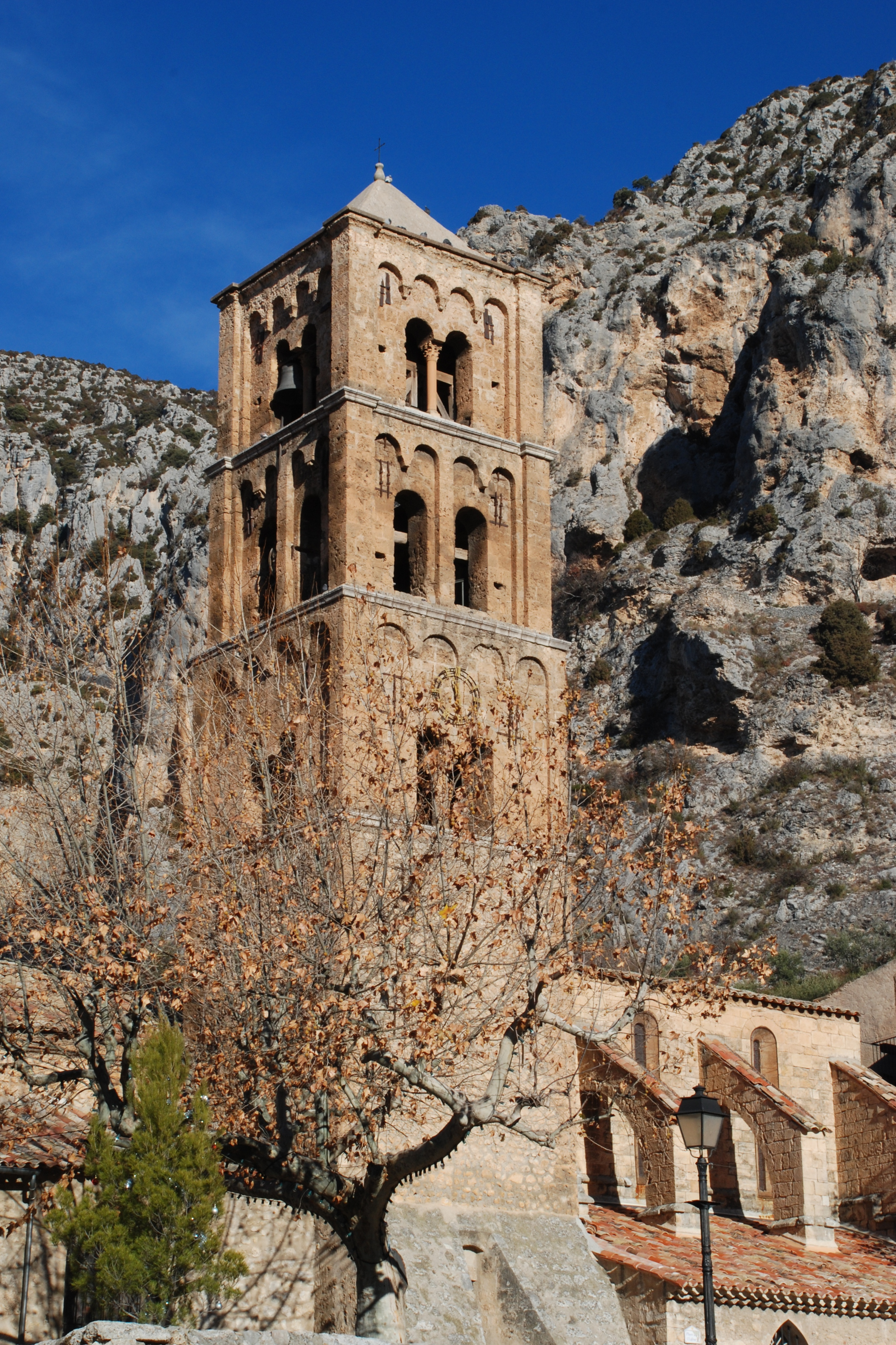 Moustiers-Sainte-Marie - Clocher roman lombard